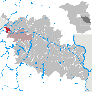 Gosen-Neu Zittau in Brandenburg (Country) - District Oder-Spree